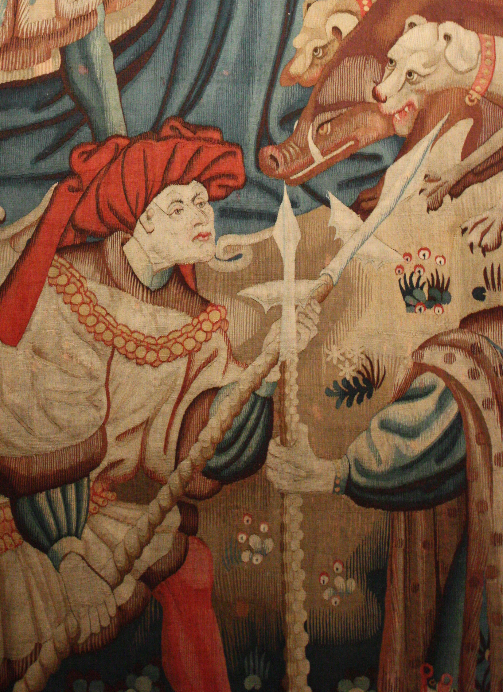 chasseurs avec épieux de chasse.